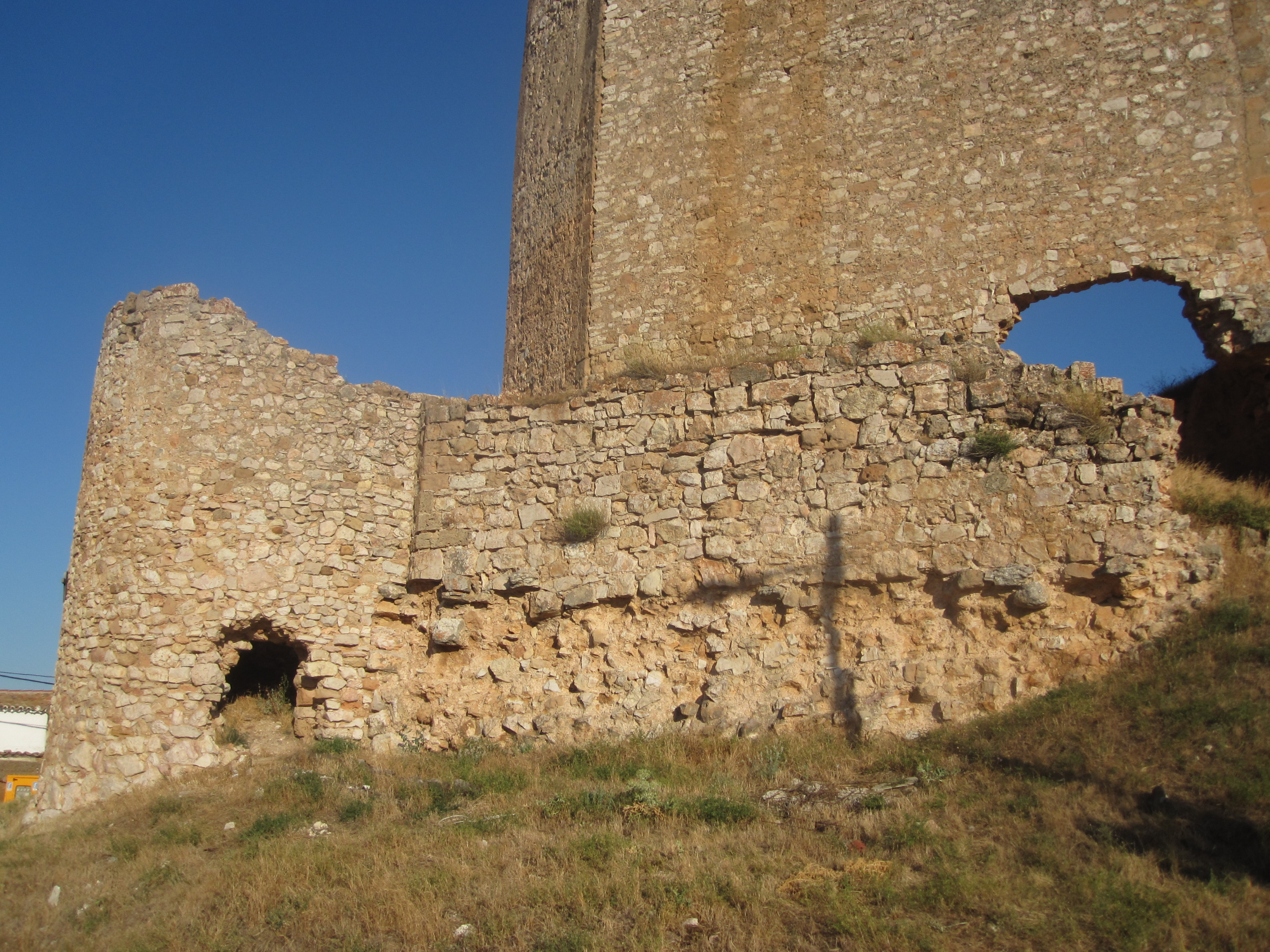 Restos de una muralla romana en Sisamon.